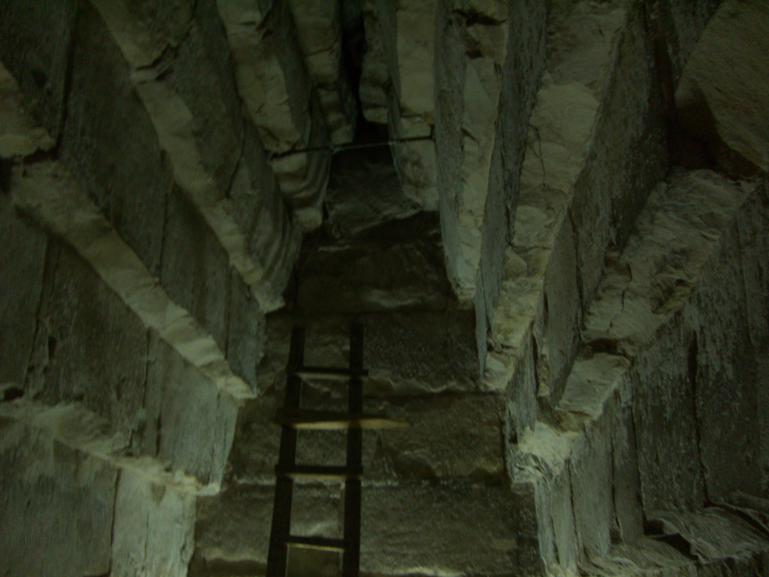 Vue de la chambre funéraire de la pyramide de Meïdoum.